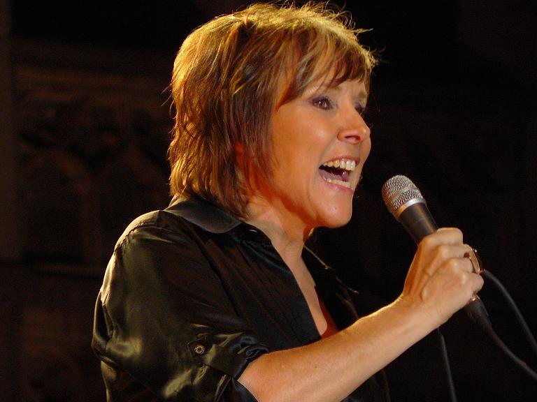 Zangers Dani Klein